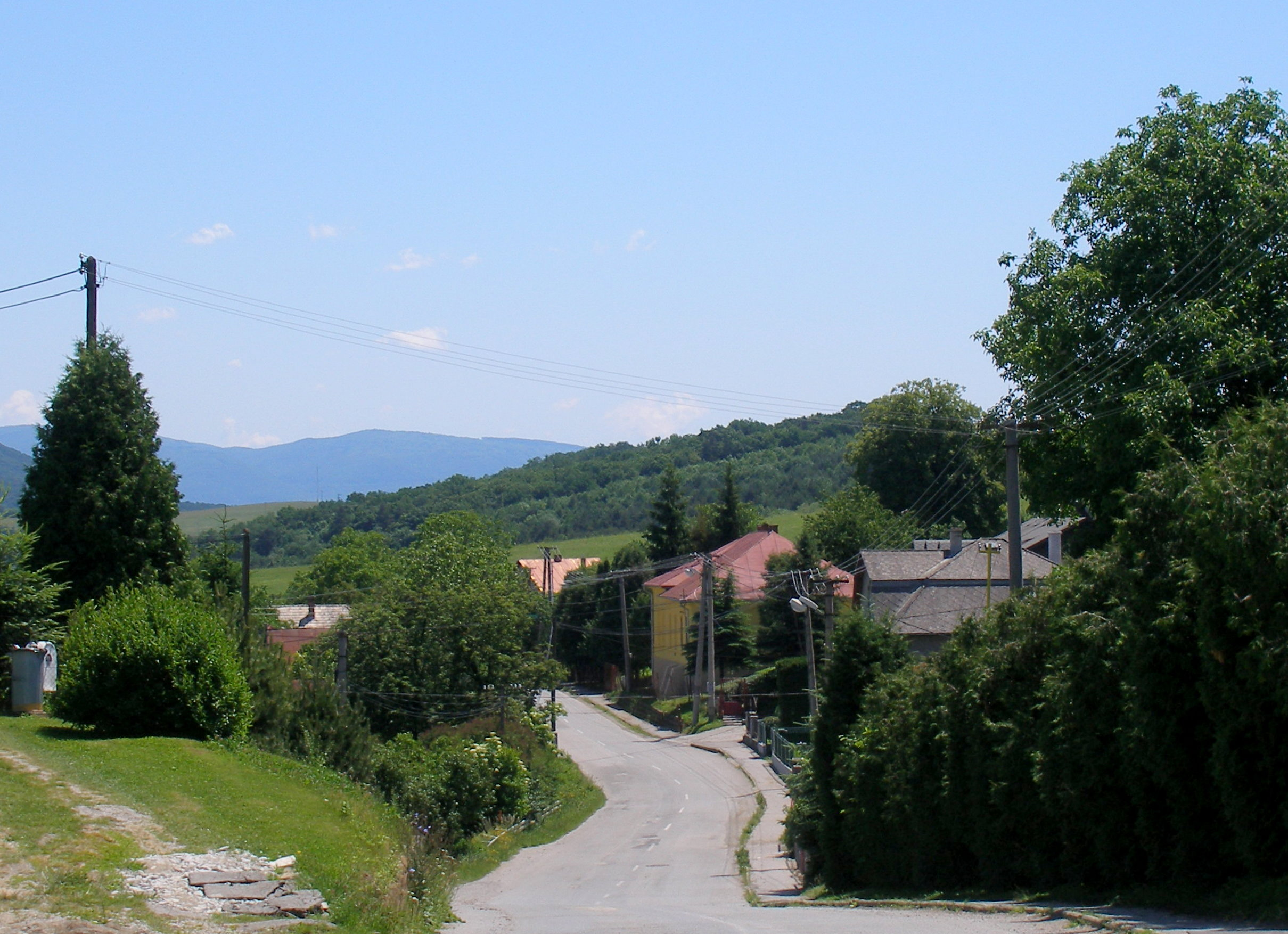 Obec Uzovce okres Sabinov